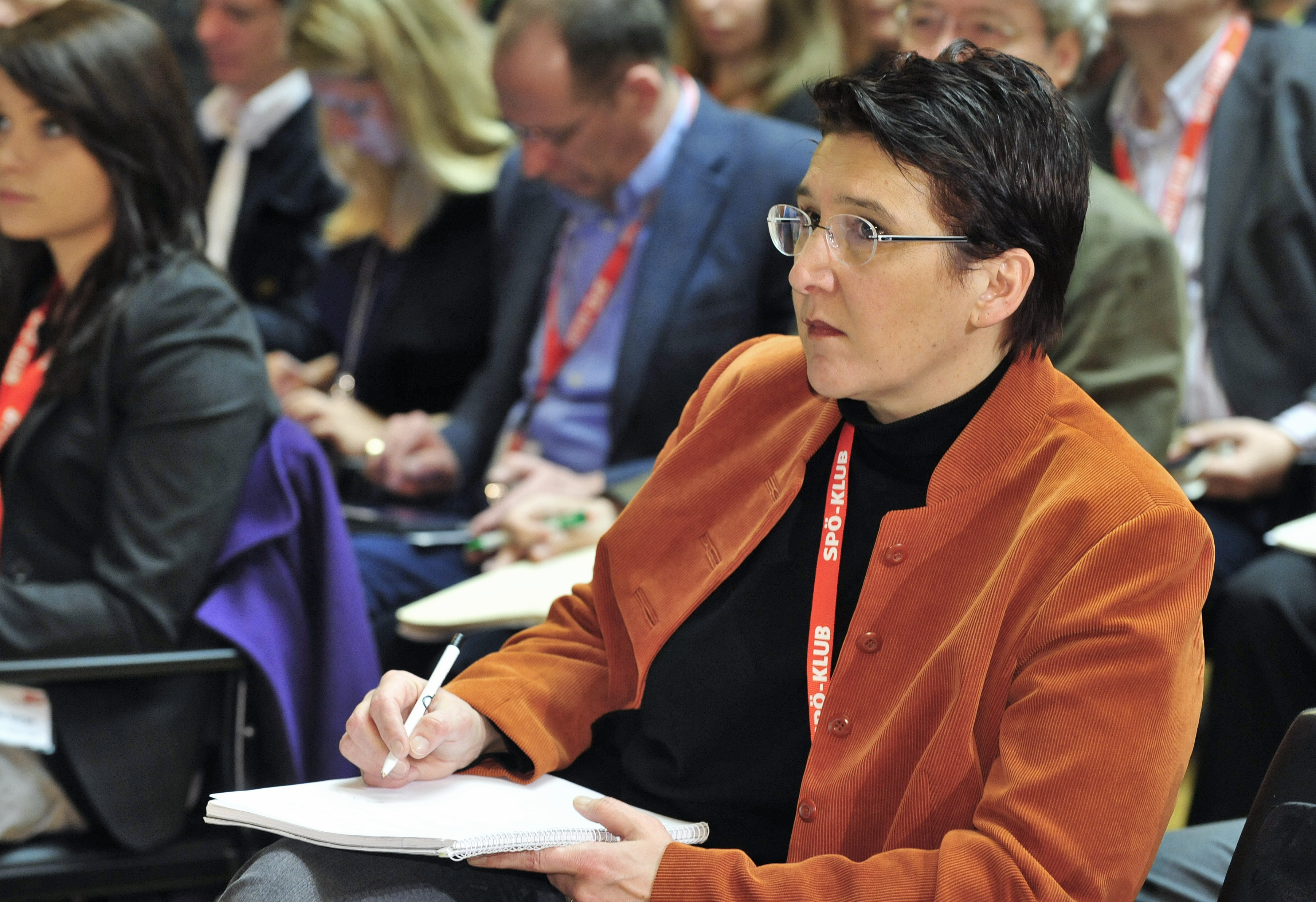 Enquete des SPÖ-Parlamentsclubs zum Thema 'Neue Netzpolitik', Herausforderungen an eine moderne Netzpolitik - die digitale Revolution demokratisch gestalten - Sonja Ablinger.